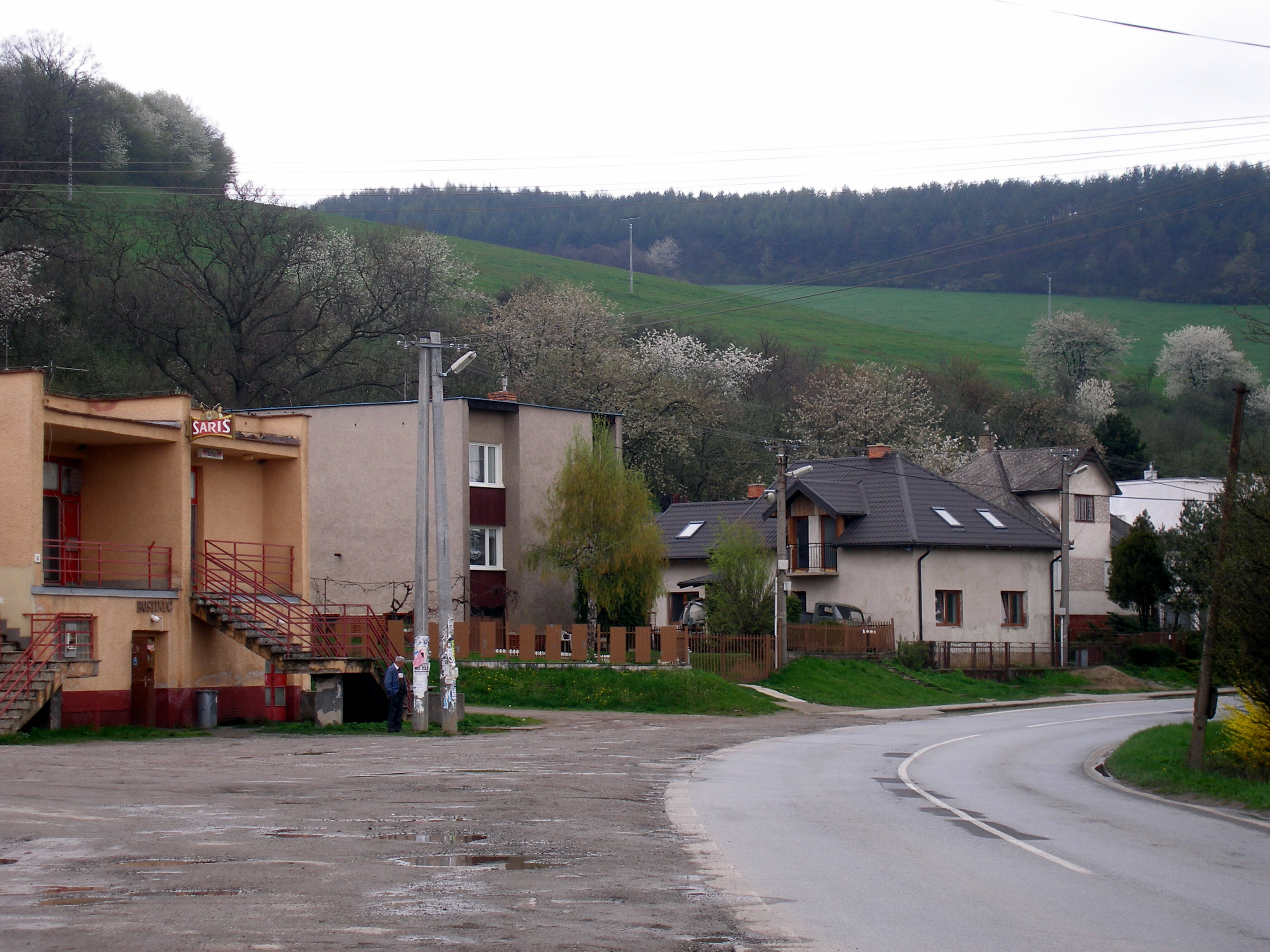 Obec Drienovská Nová Ves v okrese Prešov, región Šariš